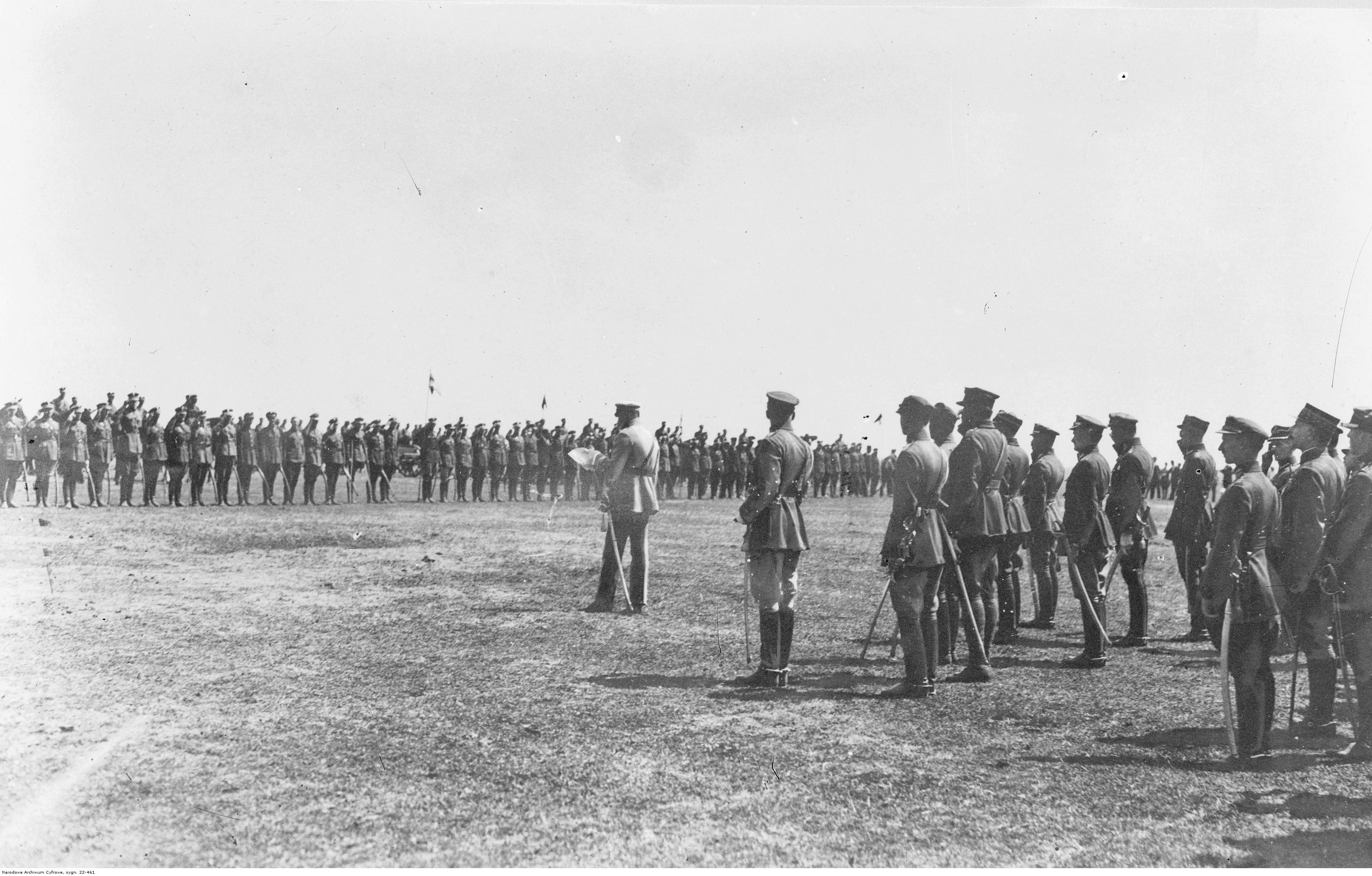 Przemówienie Naczelnika Państwa Józefa Piłsudskiego.